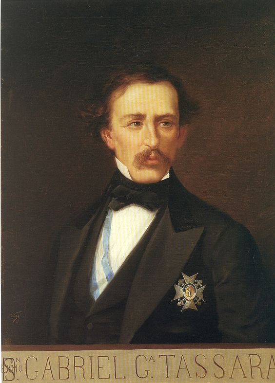 Manuel Wssel de Guimbarda - Gabriel García Tassara